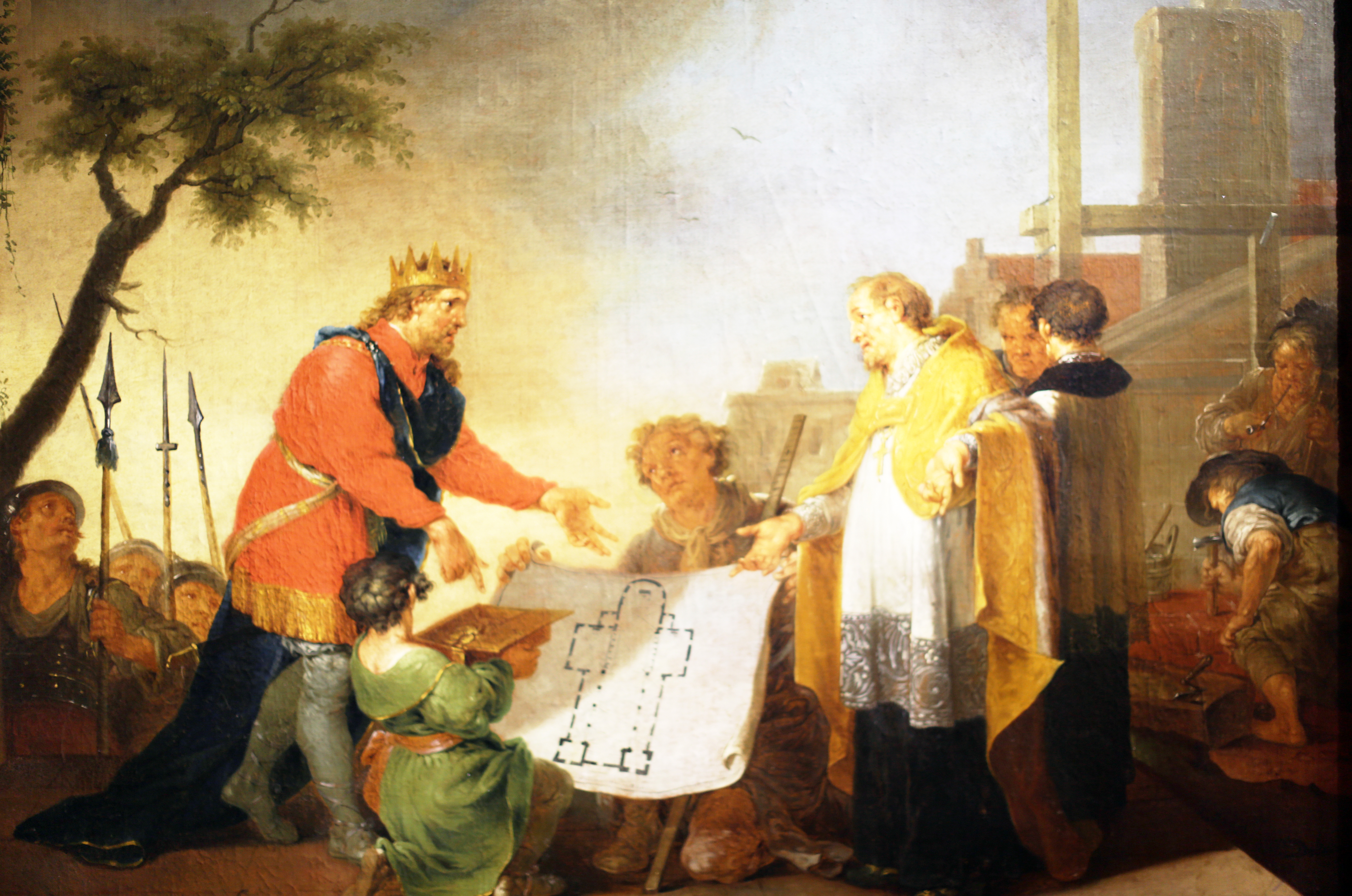 „Die Stiftung von St. Kastor“ duch den Kaiser Ludwig der Fromme in einer fiktiven Darstellung